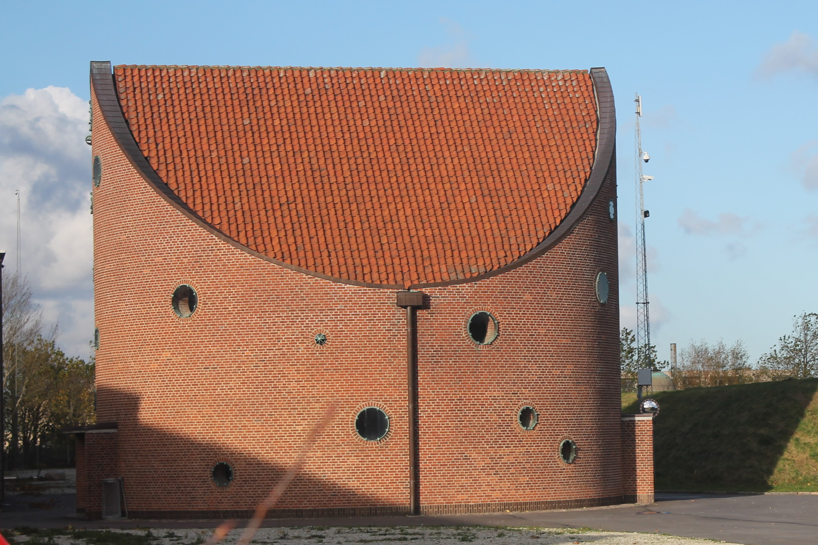 Tinghøj Vandreservoir